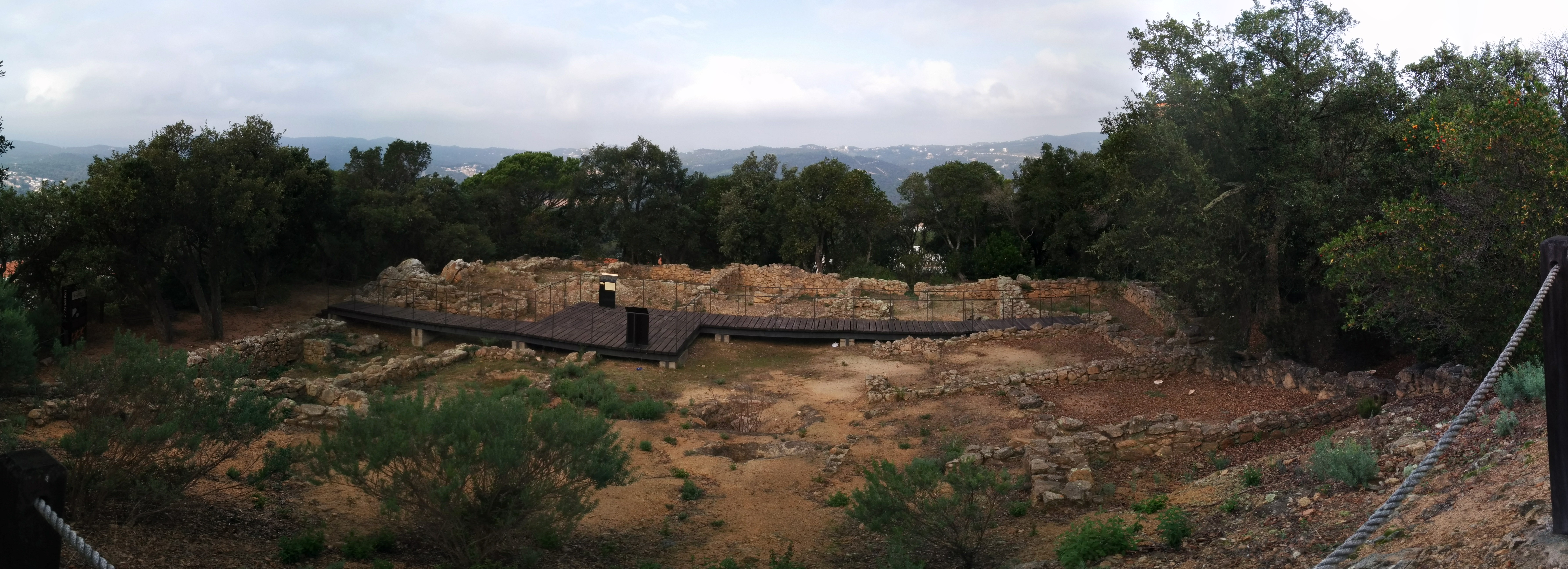 Poblat Ibèric de Puig de Castellet (Lloret de Mar) Panoràmica